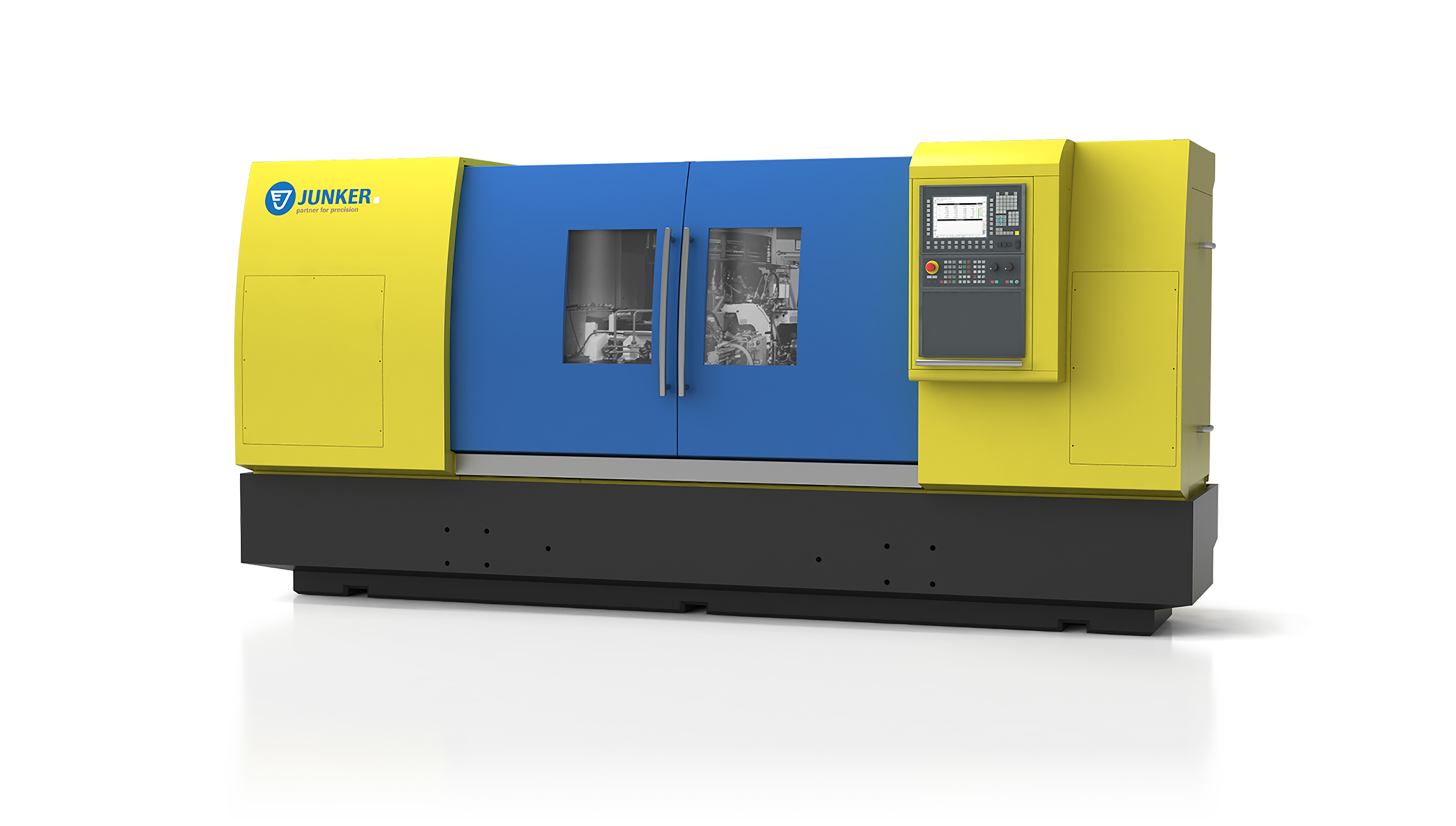 Maschinenbau